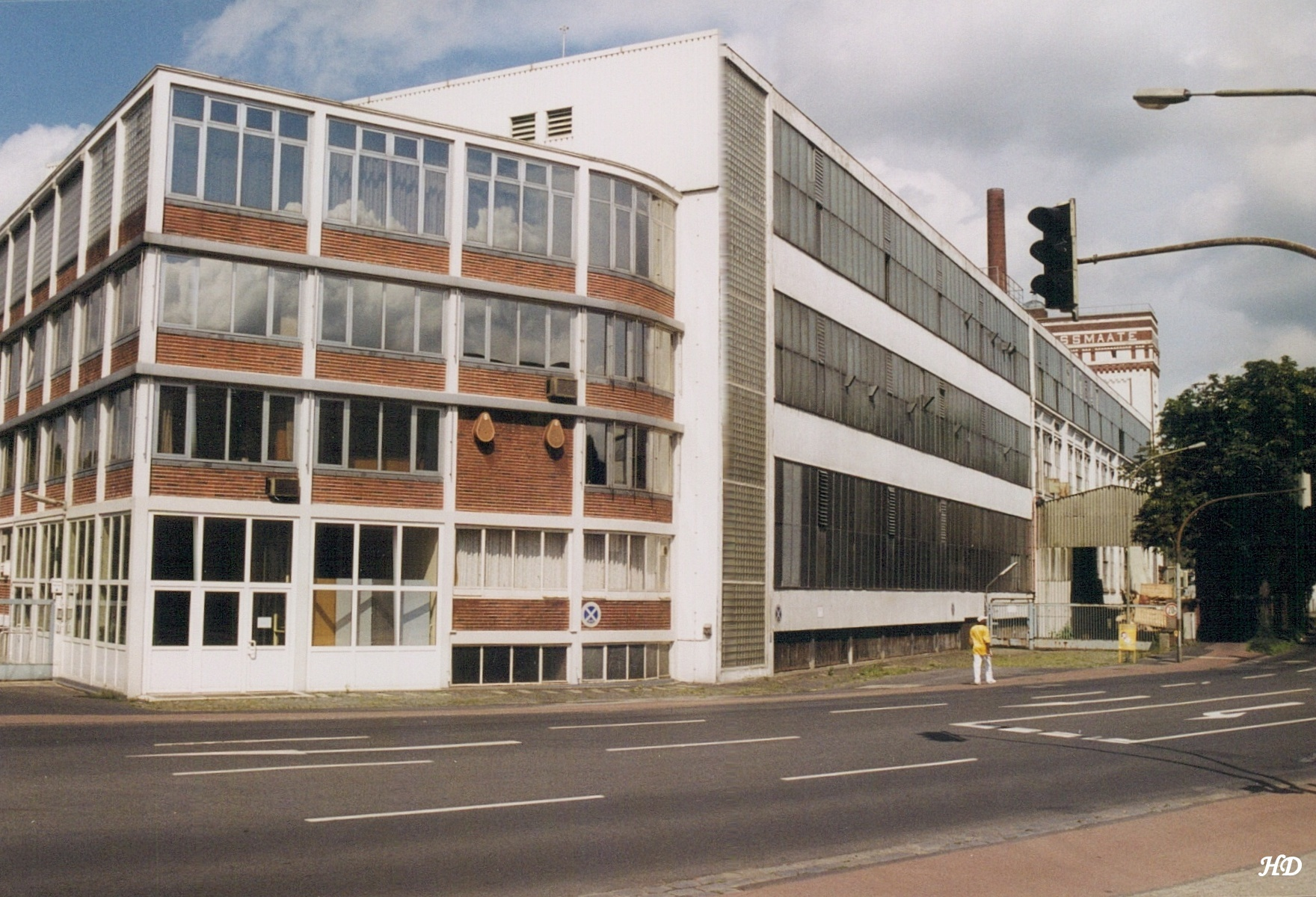 Teilansicht der Fabrikgebäude im Jahre 2001